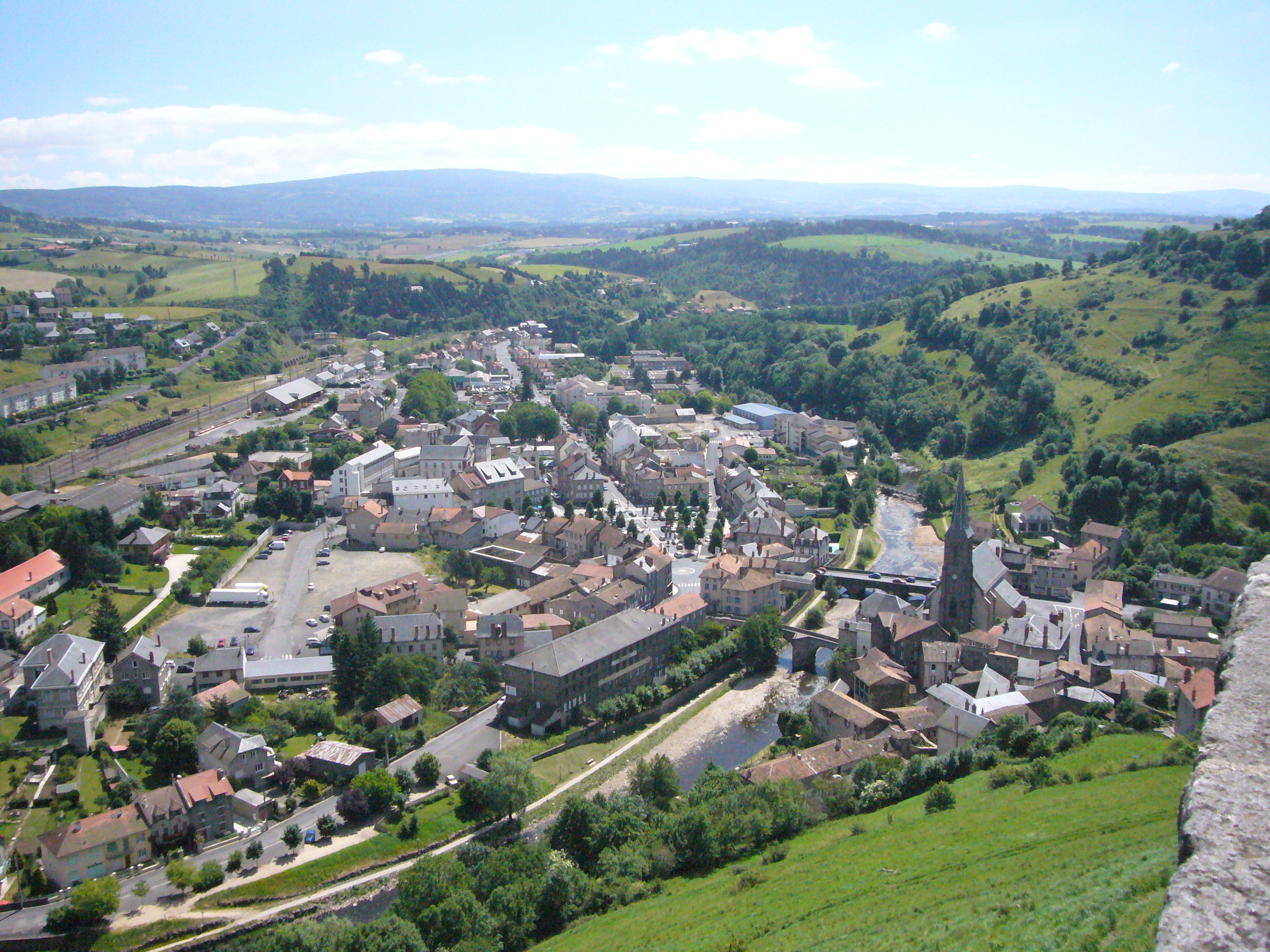 La ville basse de Saint-Flour (Cantal, France), l'Ander et les monts de la Margeride